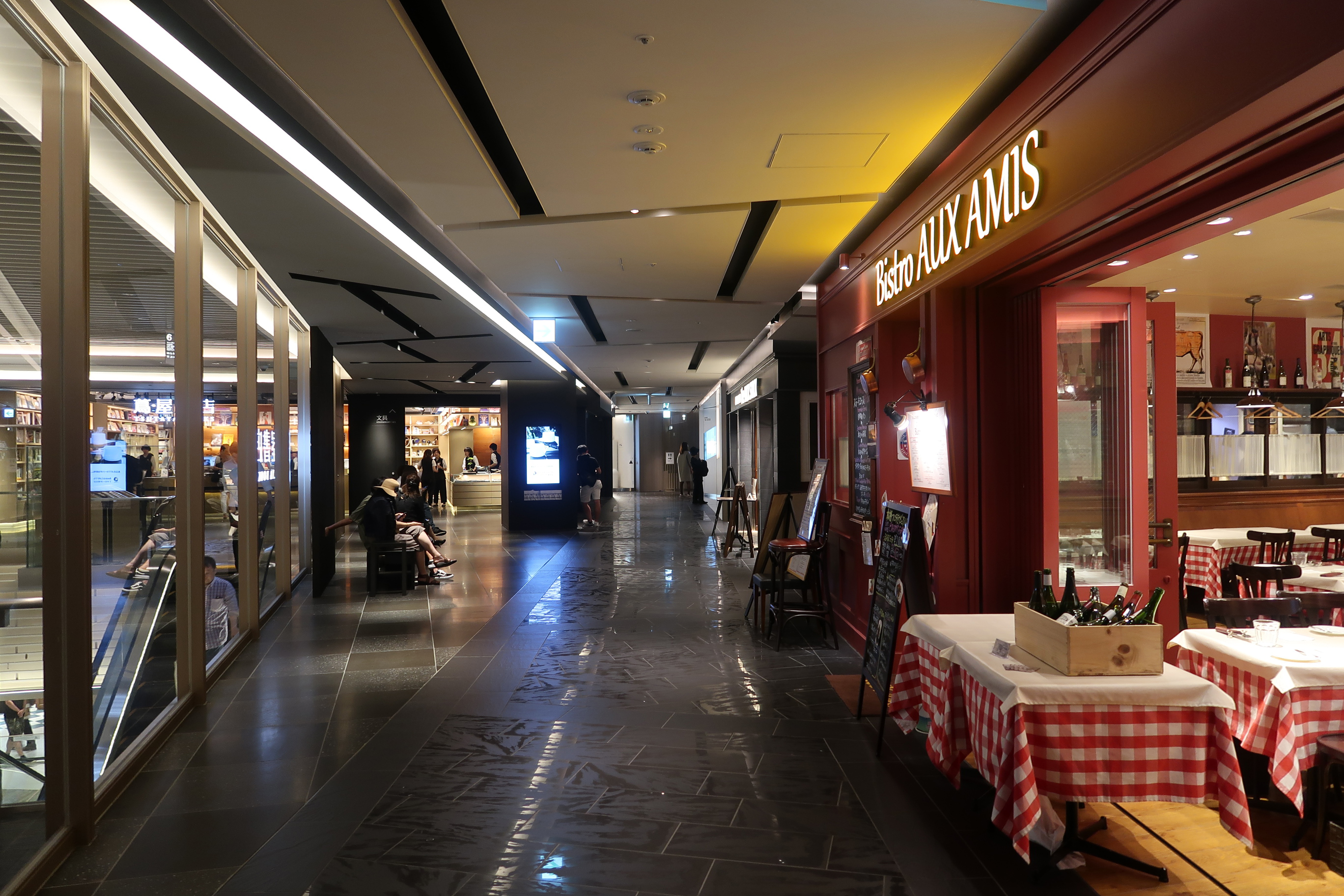 GINZA SIX Level 6